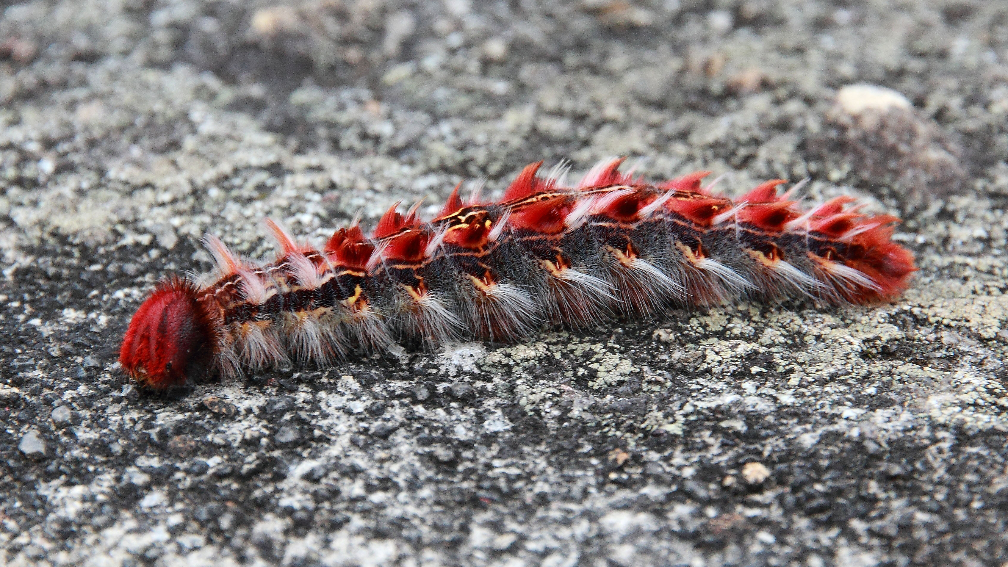 Lagarta Morpho catenarius andando na pedra em Nova Friburgo, RJ.